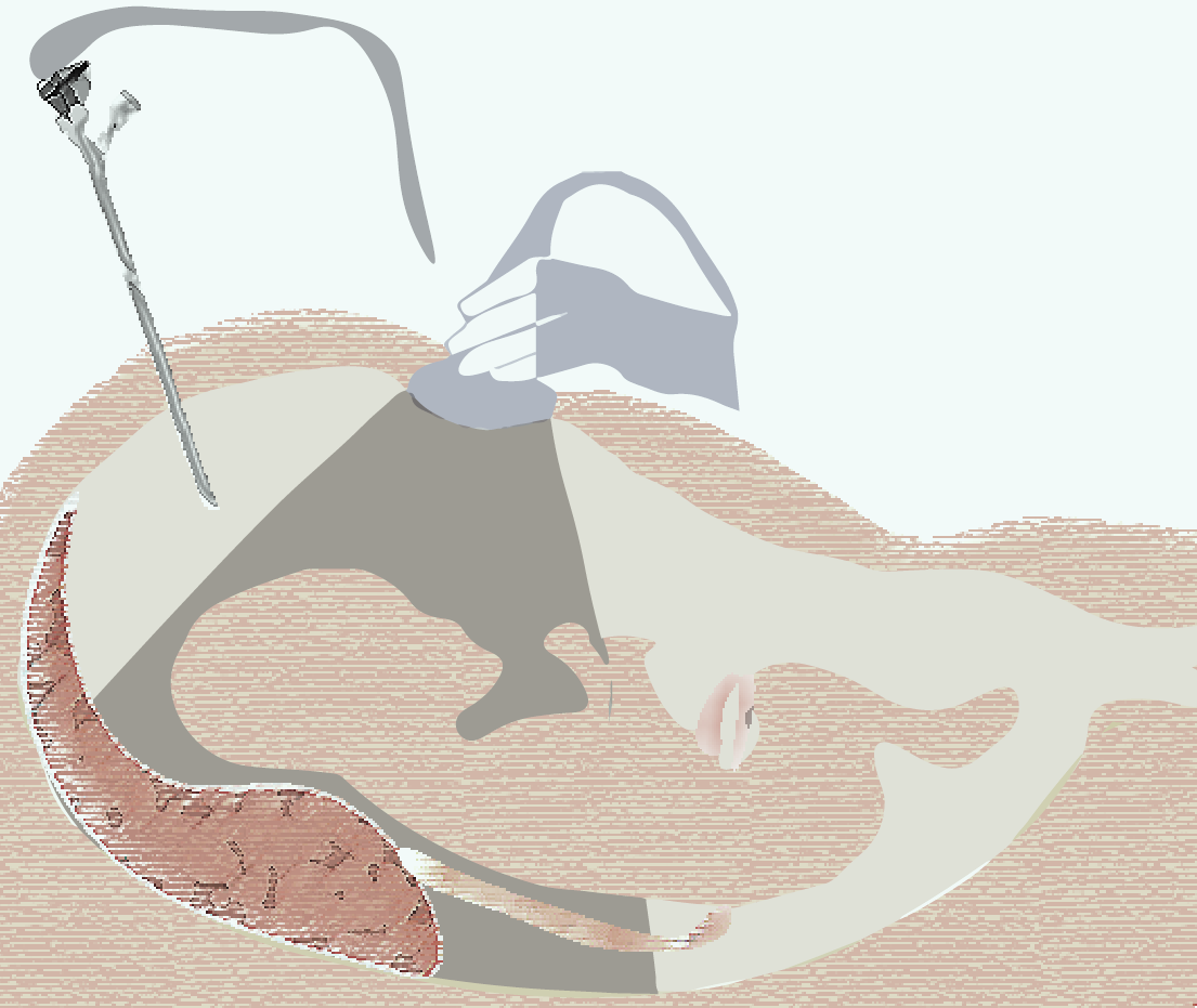 Fœtoscopie